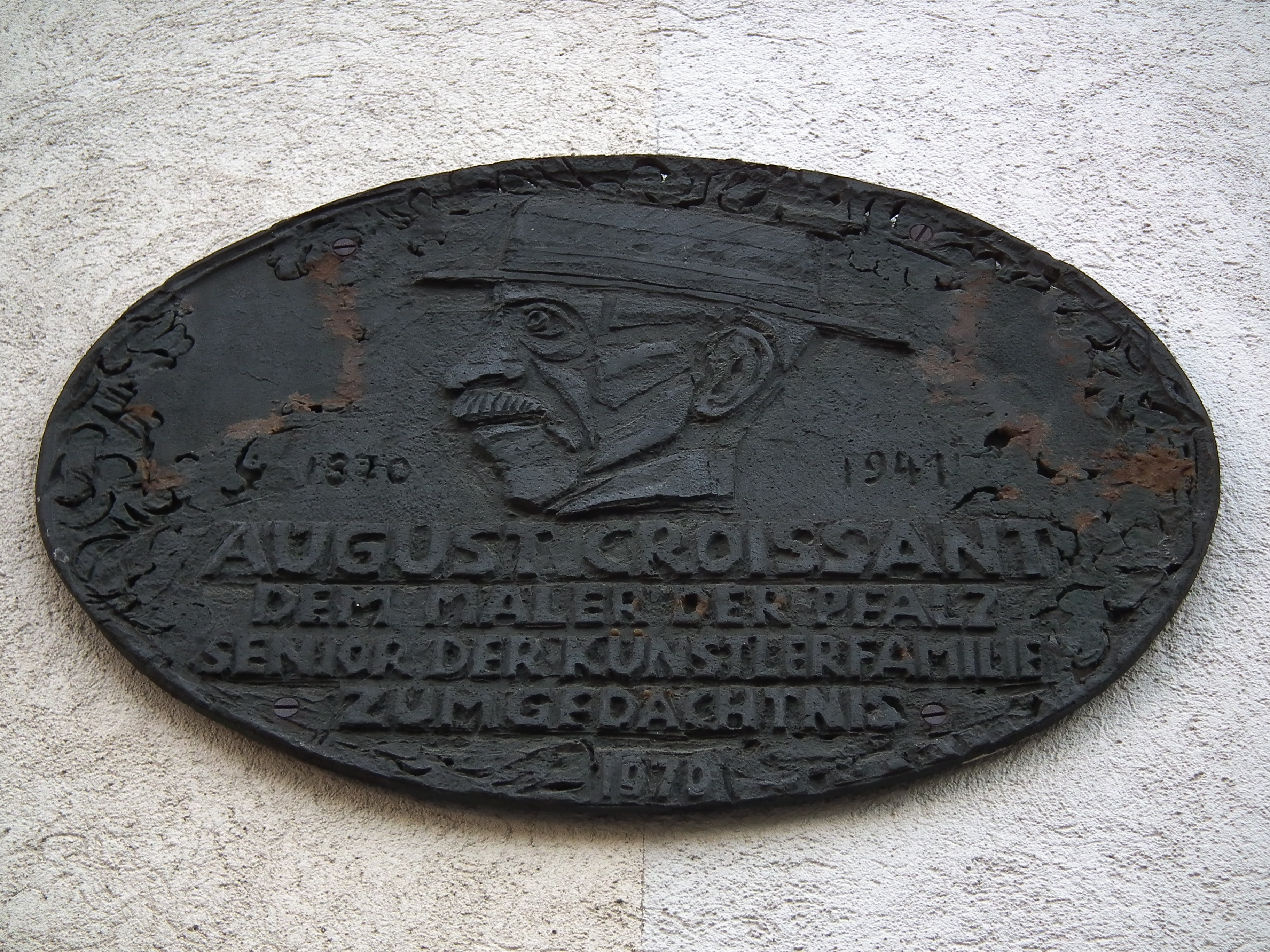 Tafel zum Gedächtnis an August Croissant (1870-1941), fotografiert in Landau (Rheinland-Pfalz, Deutschland)